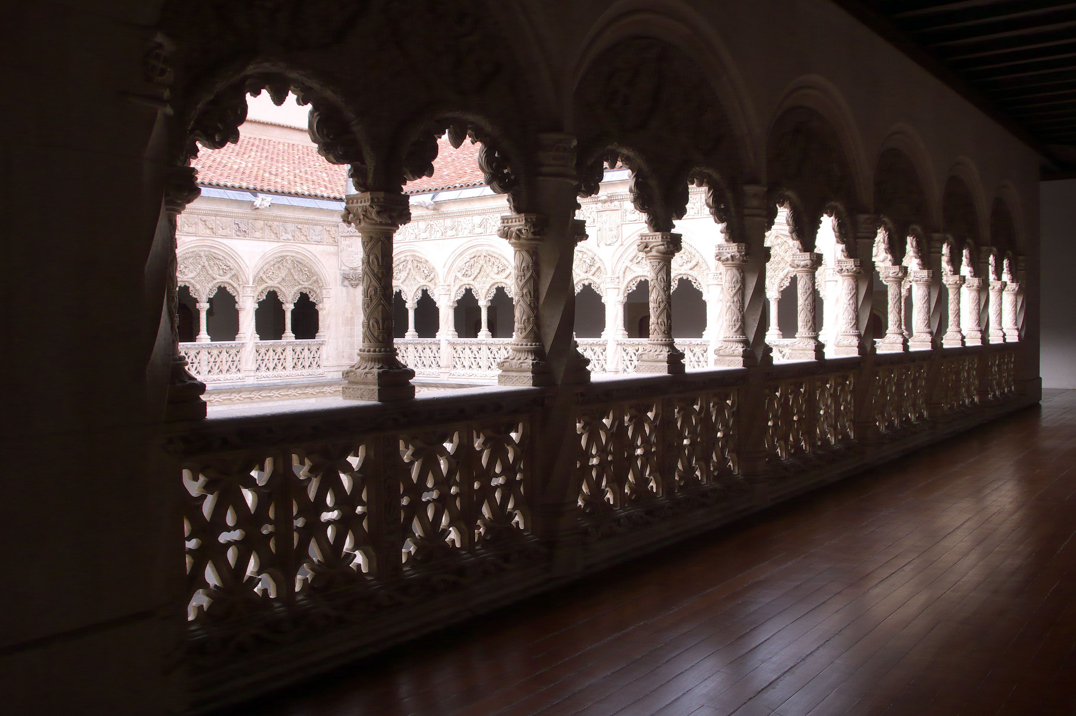 Patio del colegio de San Gregorio en Valladolid. Impresionante ejemplar del arte gótico hispano-flamenco atribuído a Juan Guas